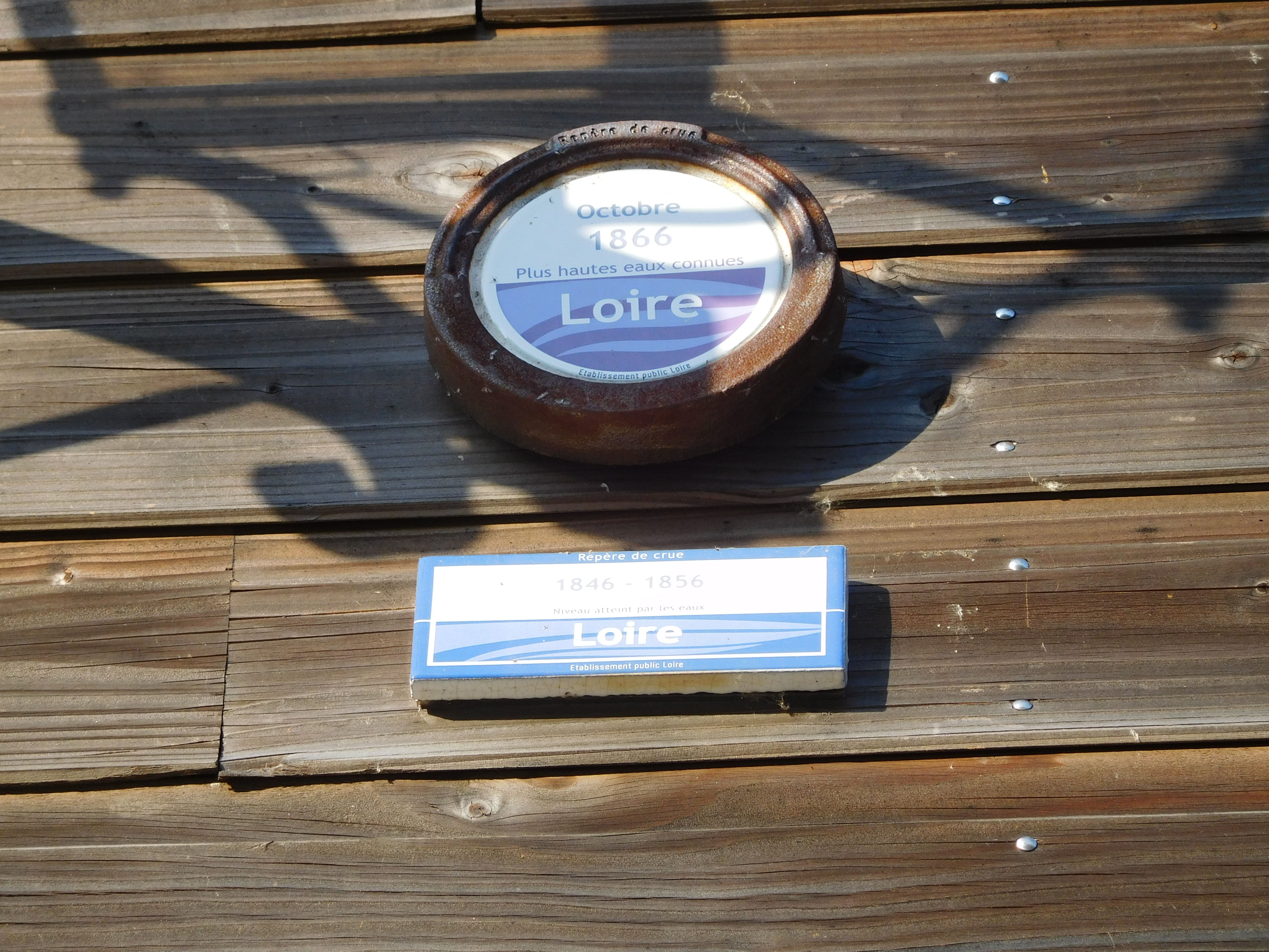 Repères de crue : octobre 1866 et 1846-1856, Bonny-sur-Loire, Loiret, France.